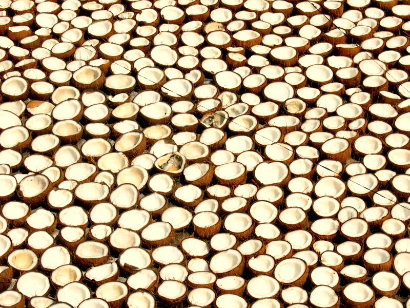 Calicut, Kerala